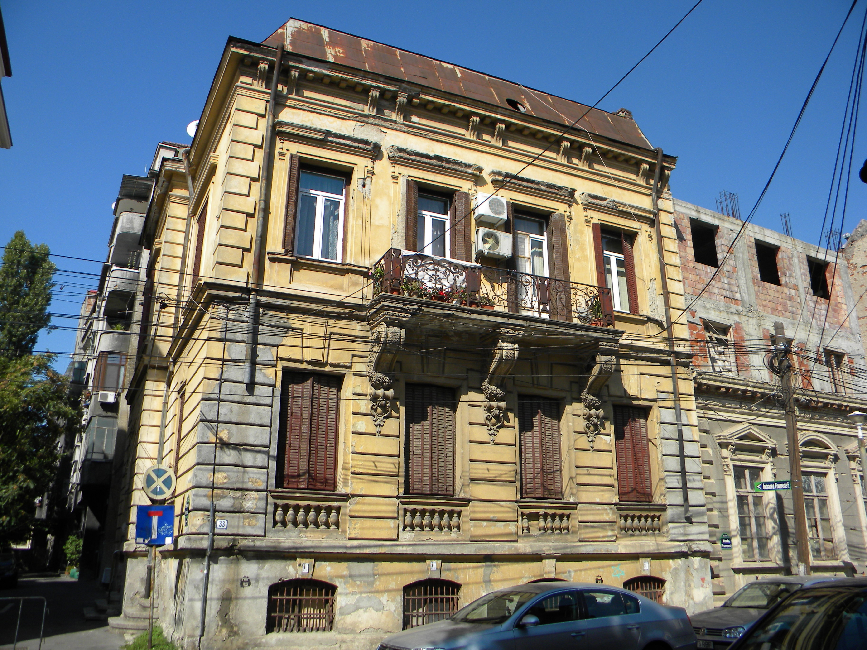 Bucuresti, Romania, Casa pe Str. Frumoasa nr. 33, sect. 1